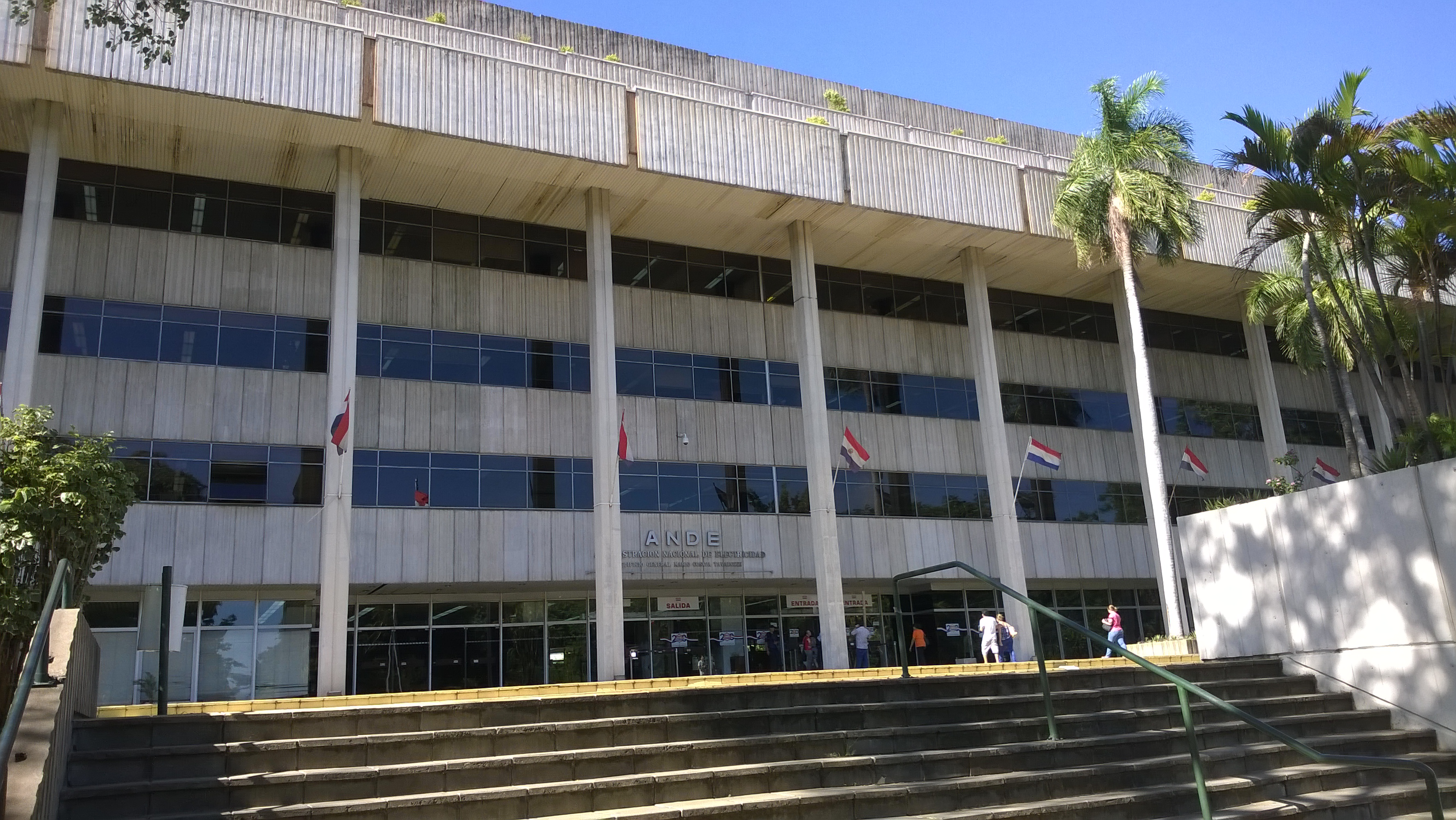 Acceso principal ANDE